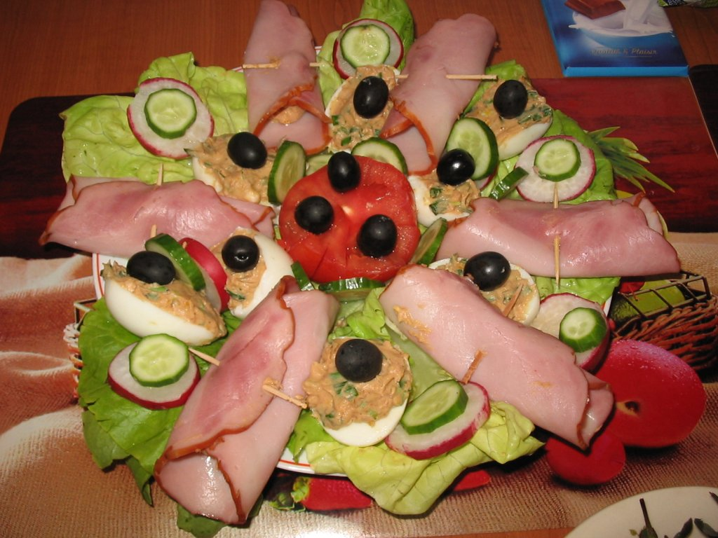 Romanian cold meat salad.